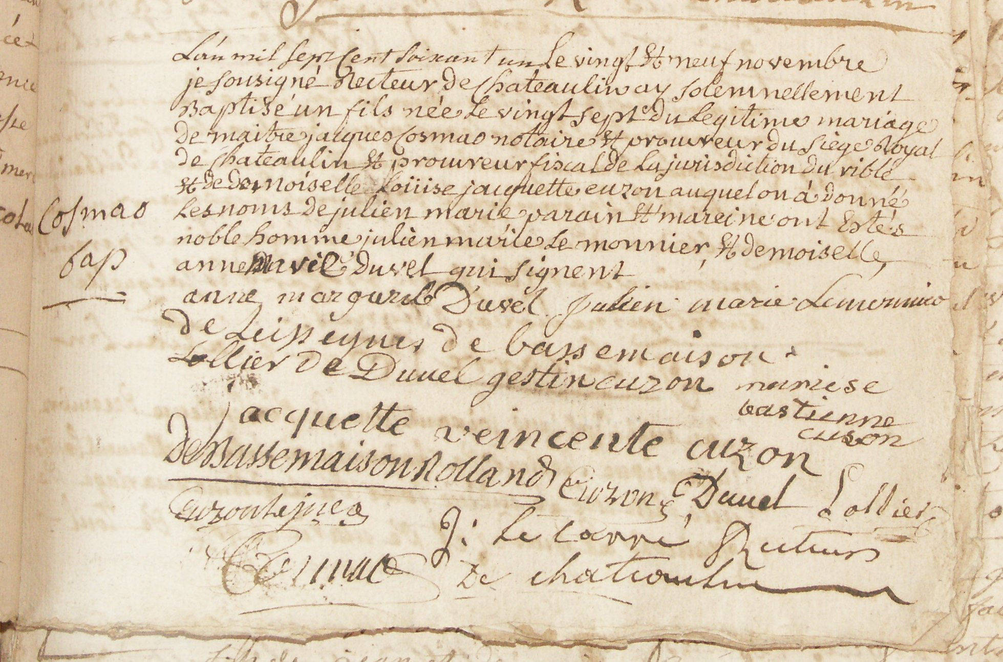 Acte de baptême de Julien-Marie Cosmao-Kerjulien, le 27 novembre 1761. Mairie du Châteaulin (Finistère).